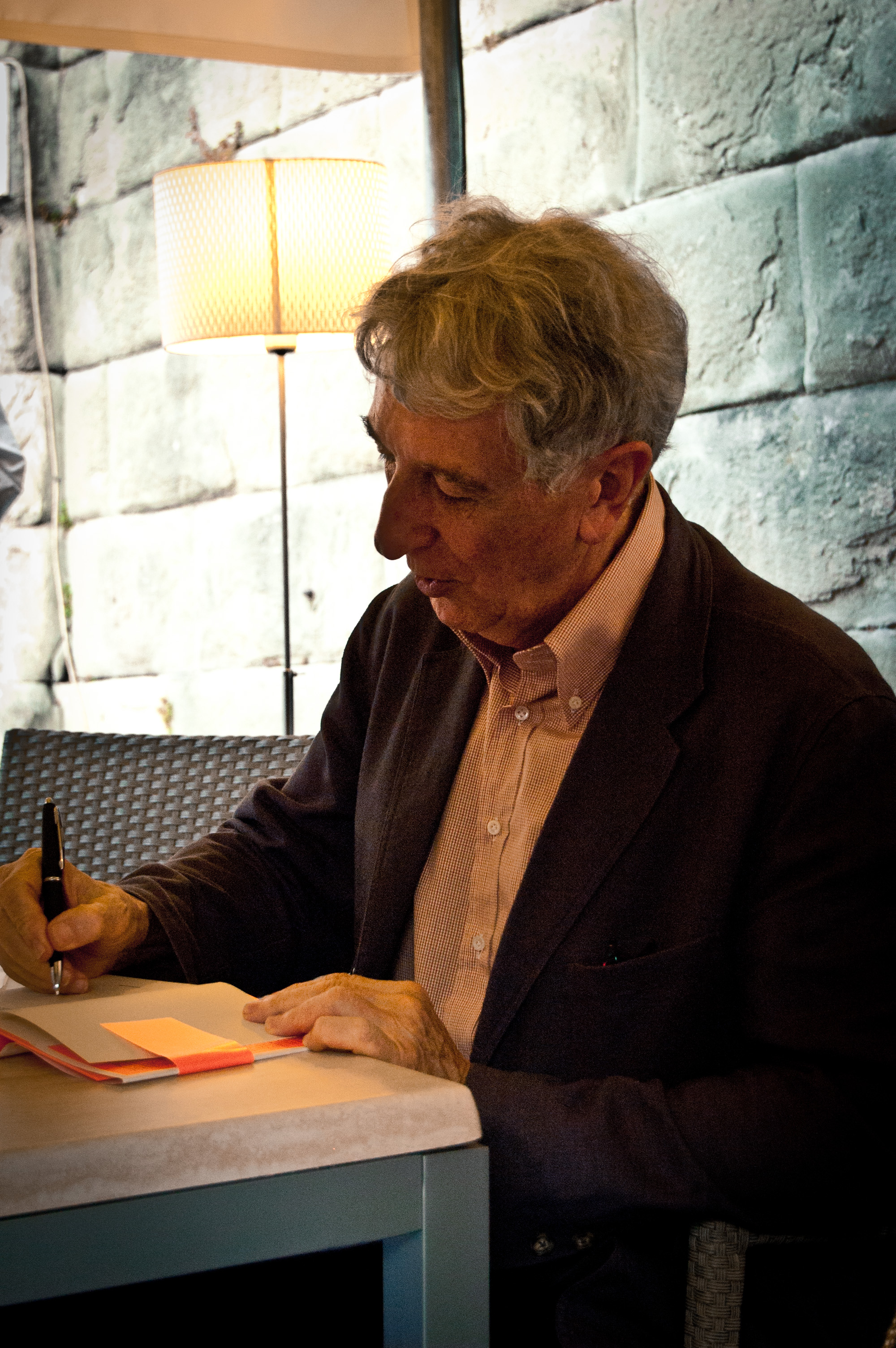 Corrado Augias, Pietrasanta, Italy.